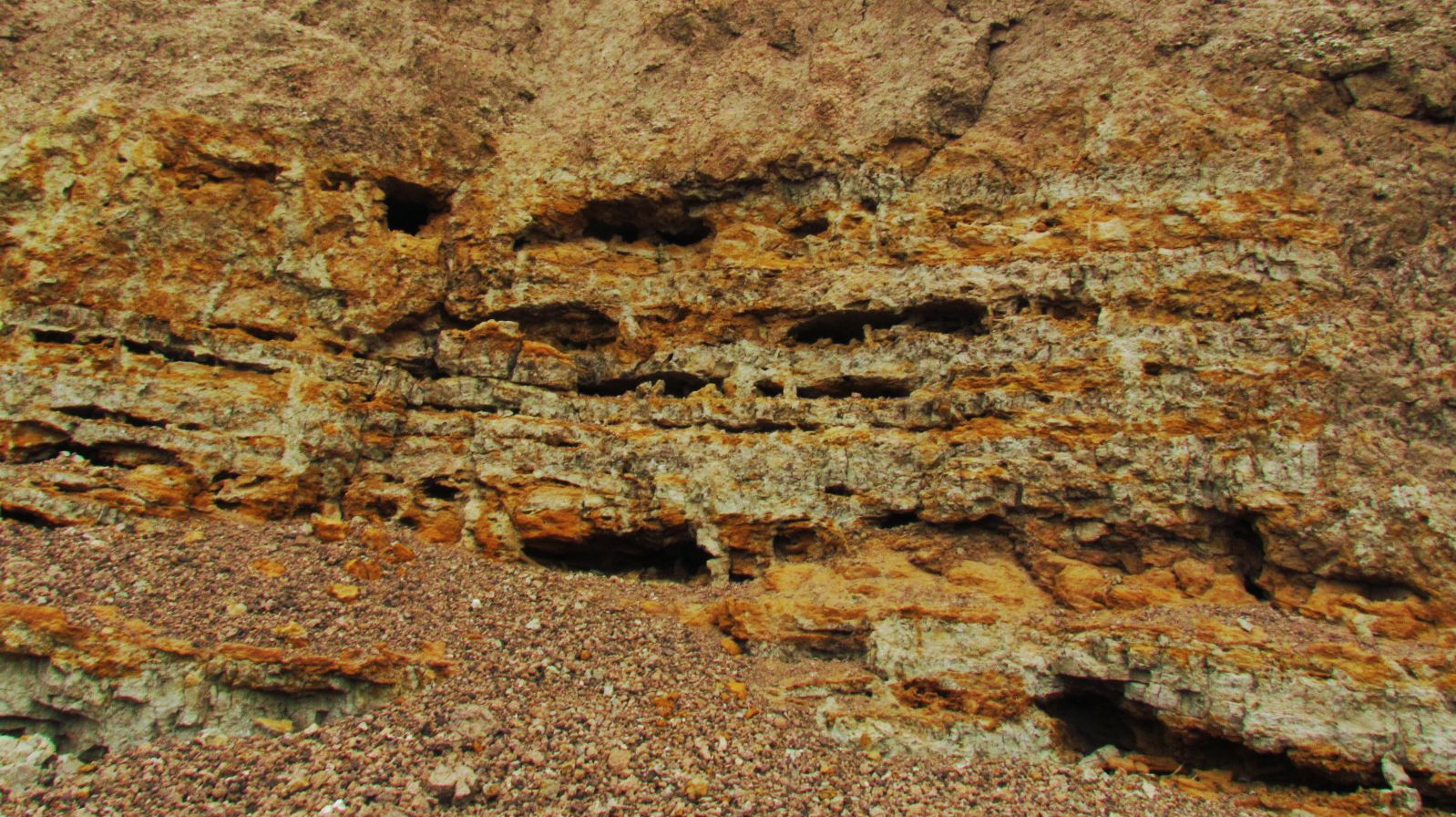 DEPOSITOS DEL MIOCENO TARDIO,ARCILLA DORADA